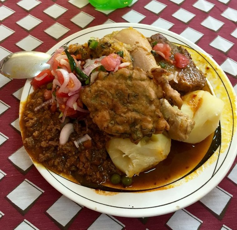 Distintas carnes con picante amarillo, zarza y papas con arroz.